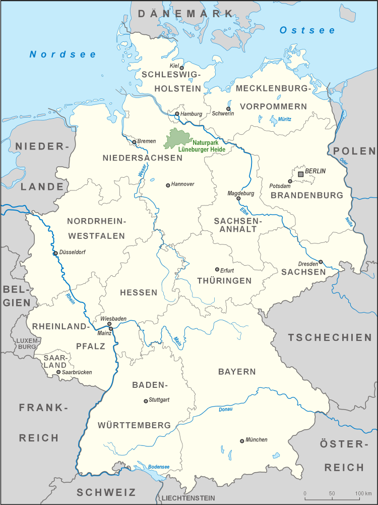 Karte des Naturparks Lüneburger Heide in Deutschland